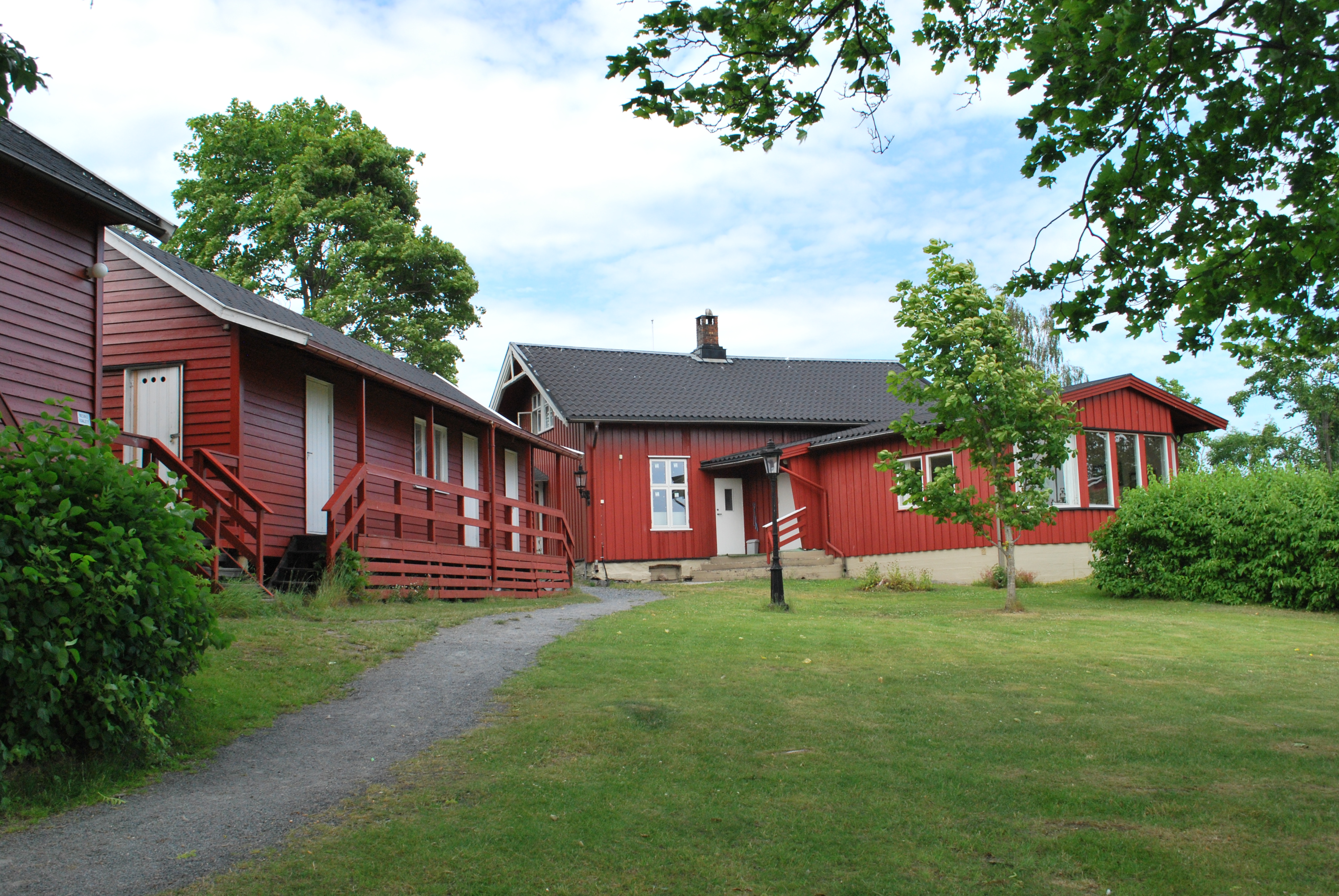 Velhuset midt på øya, Nakholmen, Oslo